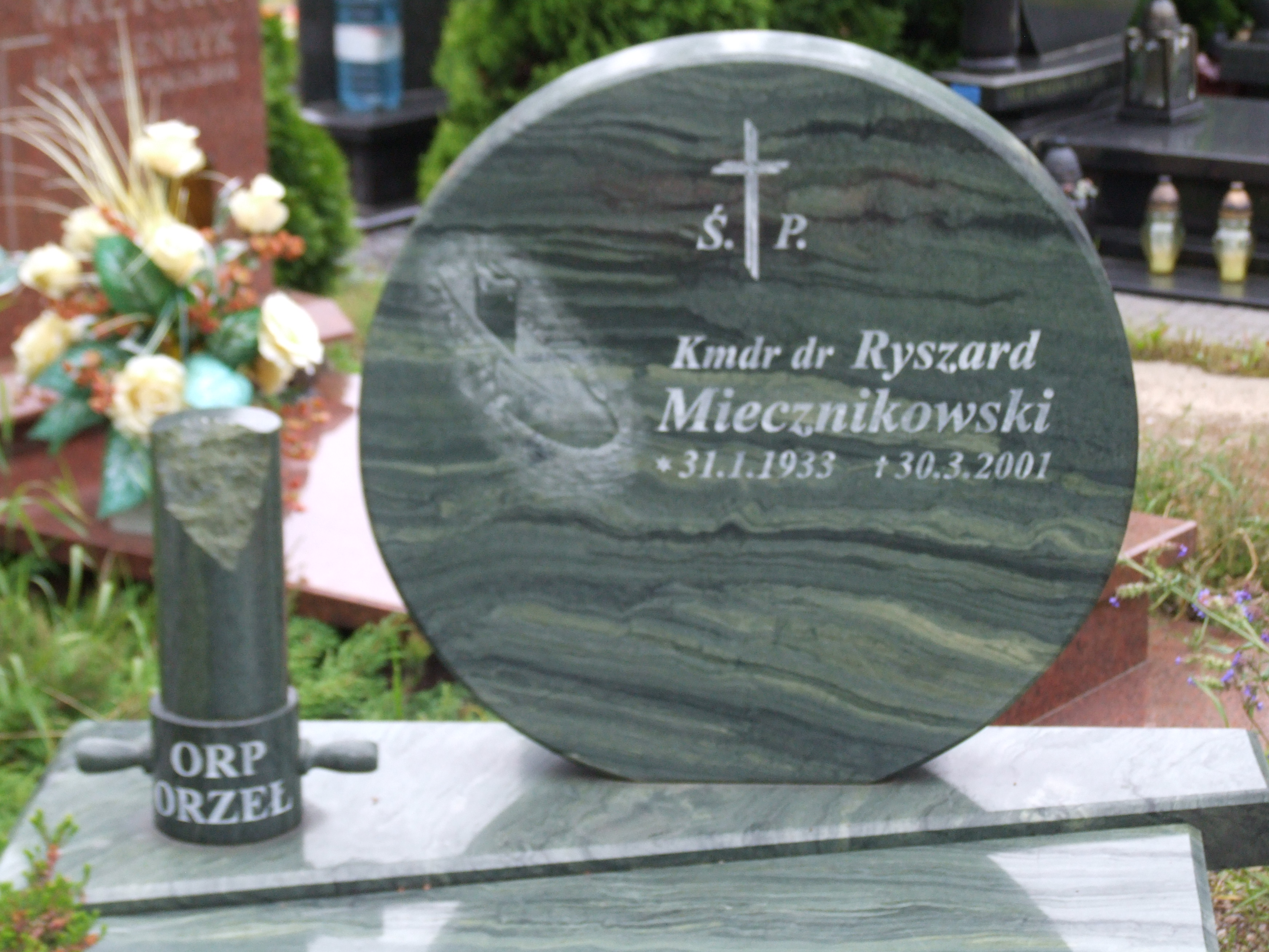 Gdynia-Oksywie Cmentarz Marynarki Wojennej